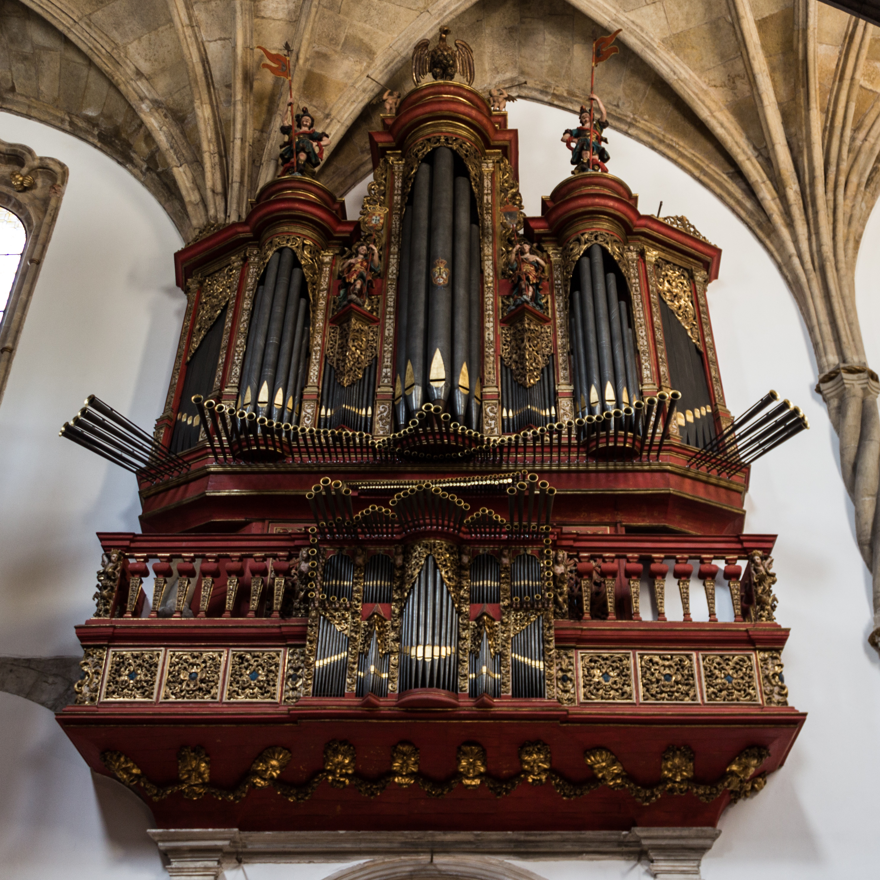 Igreja Santa Cruz organ